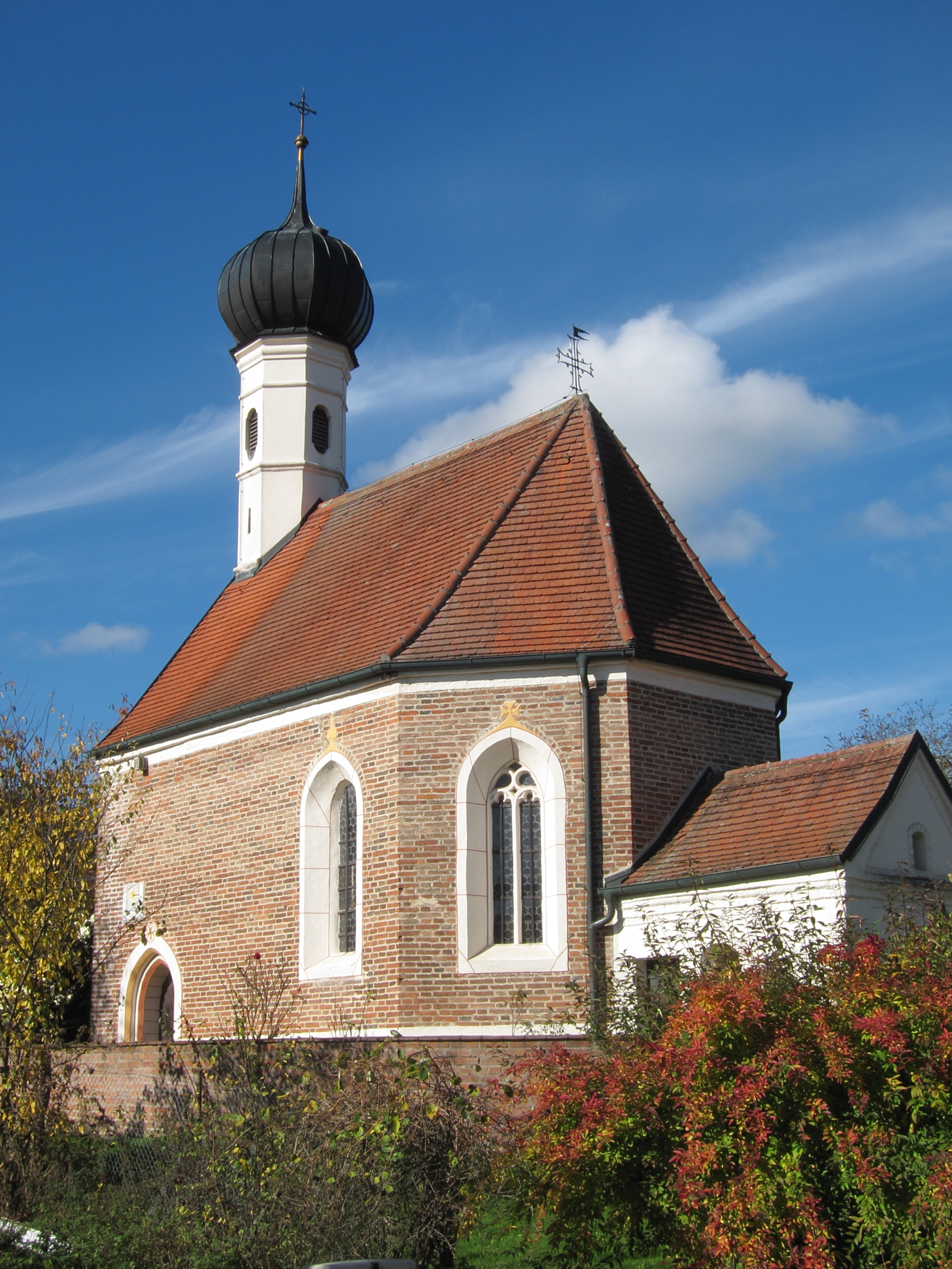 Katholische Filialkirche St. Valentin; kleiner spätgotischer Backsteinbau mit Dachreiter und angefügter Sakristei, um 1500; mit Ausstattung.